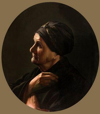 Горавский А.Г. Молящаяся старушка. 1872 г